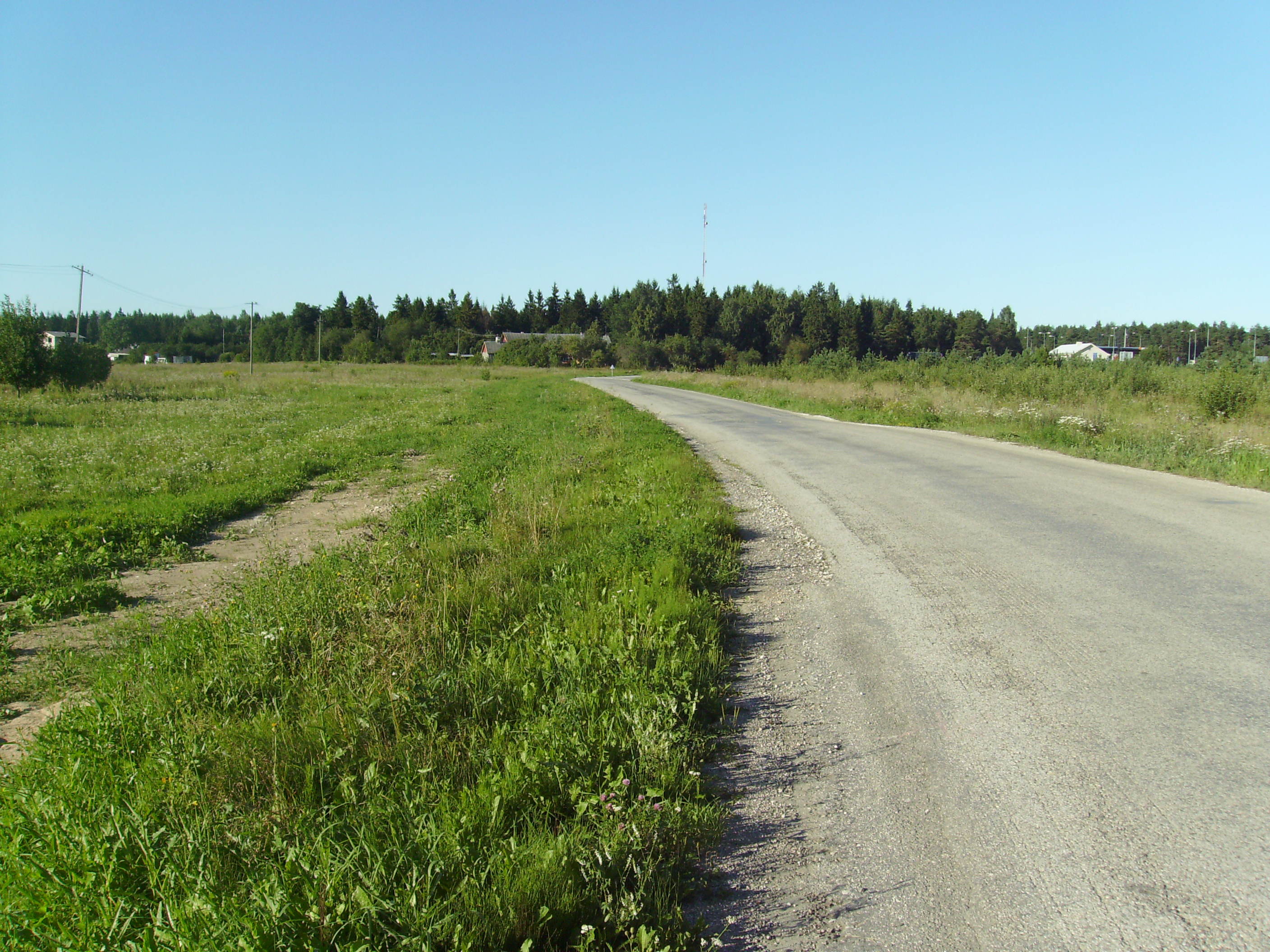 Урге.